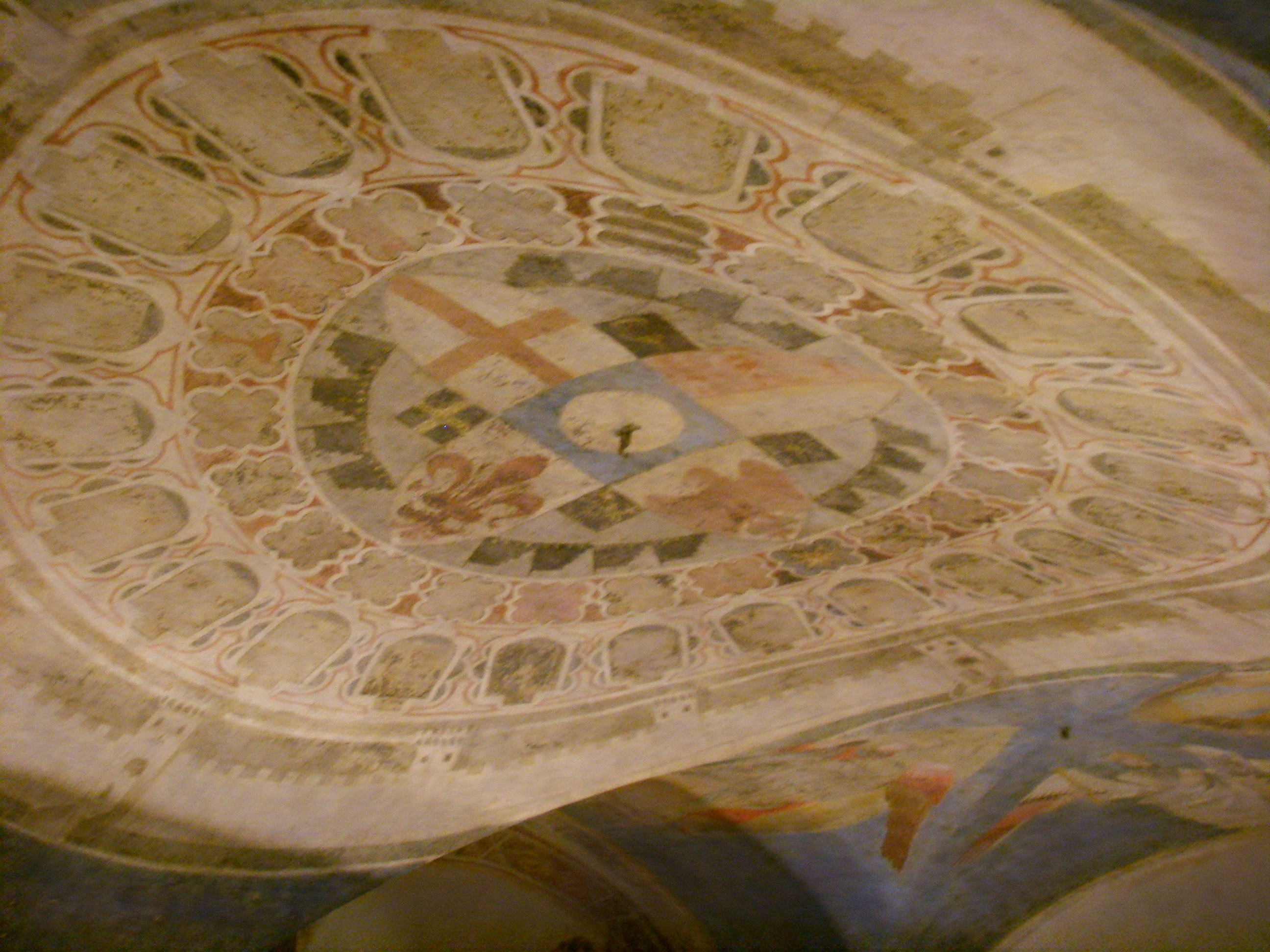 Palazzo_dell'Arte_dei_giudici_e_notai frescos in Florence, italy